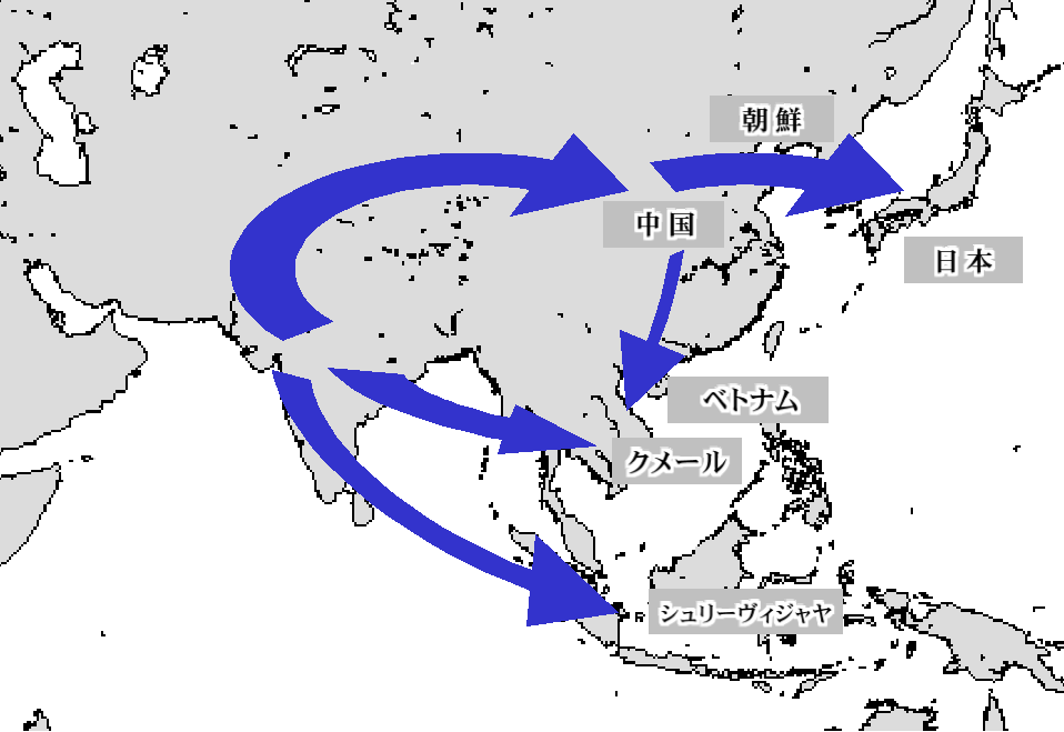 仏教公伝地図